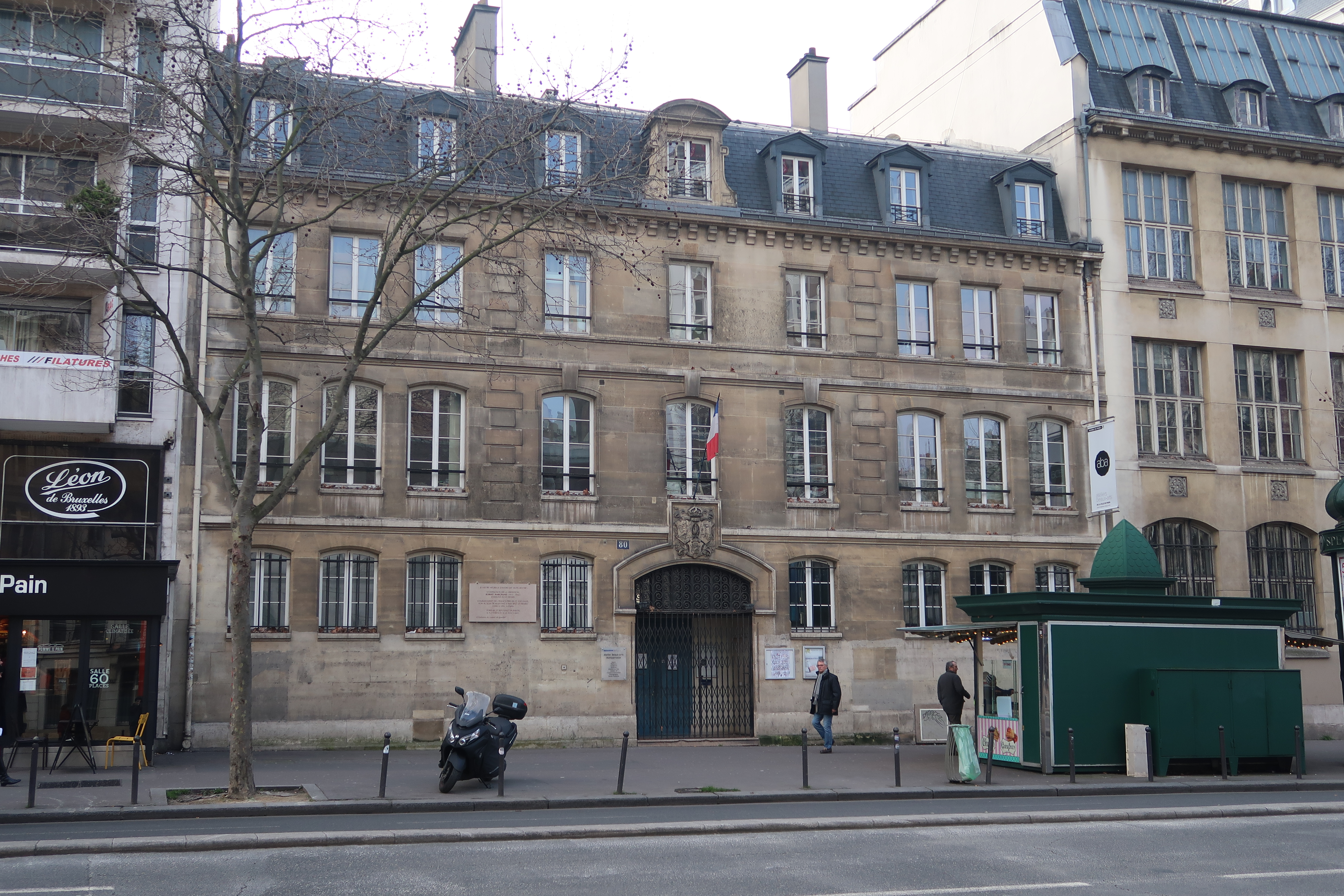 80 boulevard du Montparnasse (Paris, 14e).